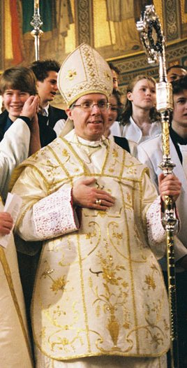 Czeslaw Kozon, biskop for de danske katolikker og bærer således titlen som biskop af København. Her efter en messe i Sankt Ansgar Kirke i København.